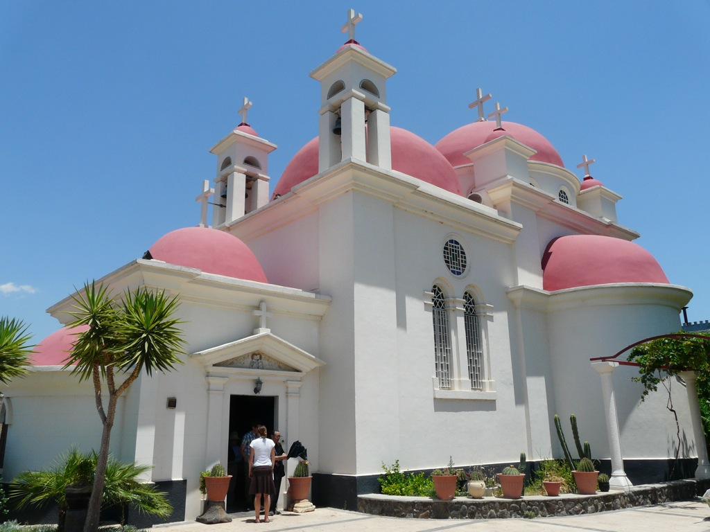 Греческая православная церковь Двенадцати Апостолов в Капернауме, в Израиле